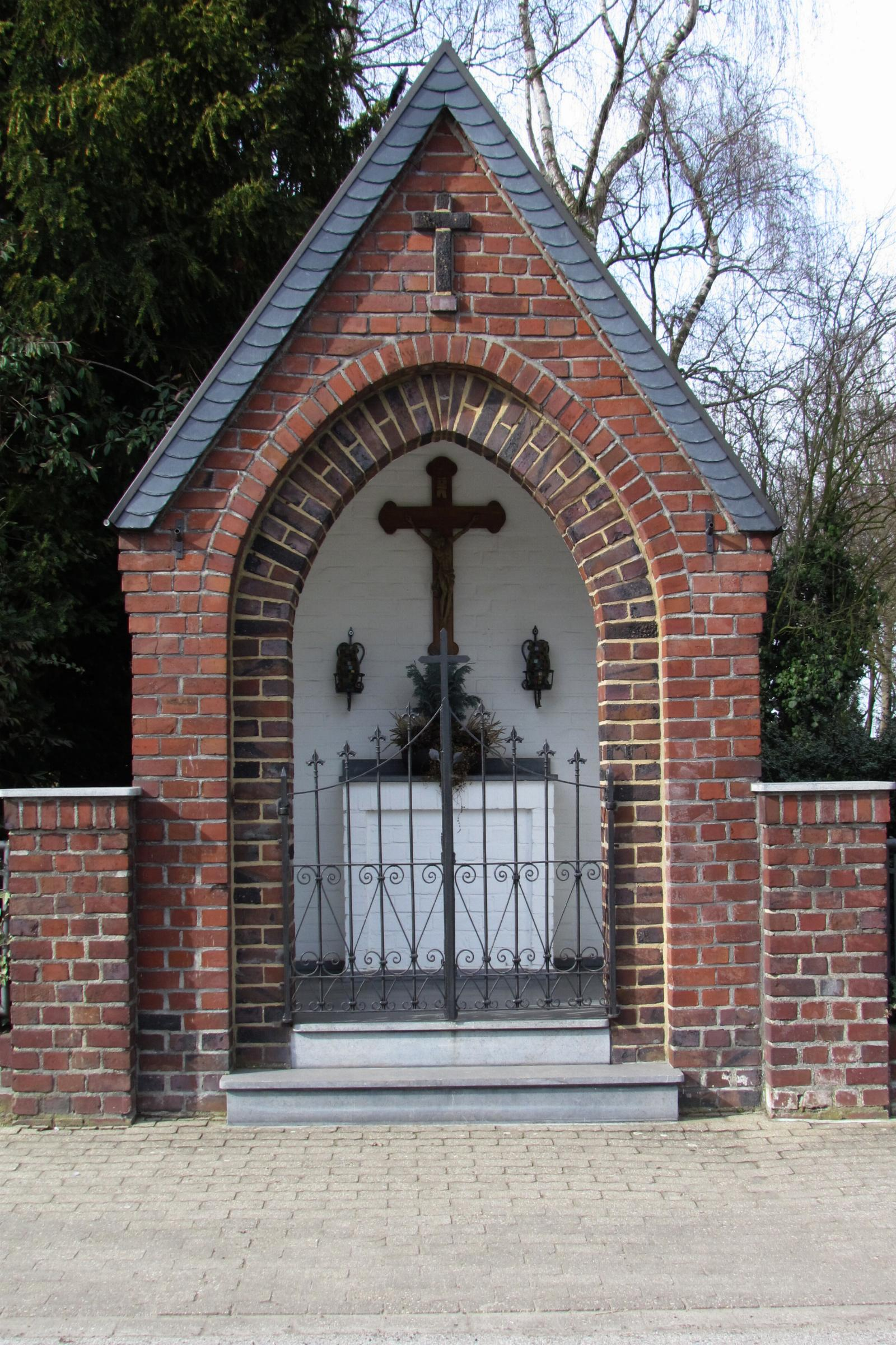 Kapell am Friedhof in Hastenrath